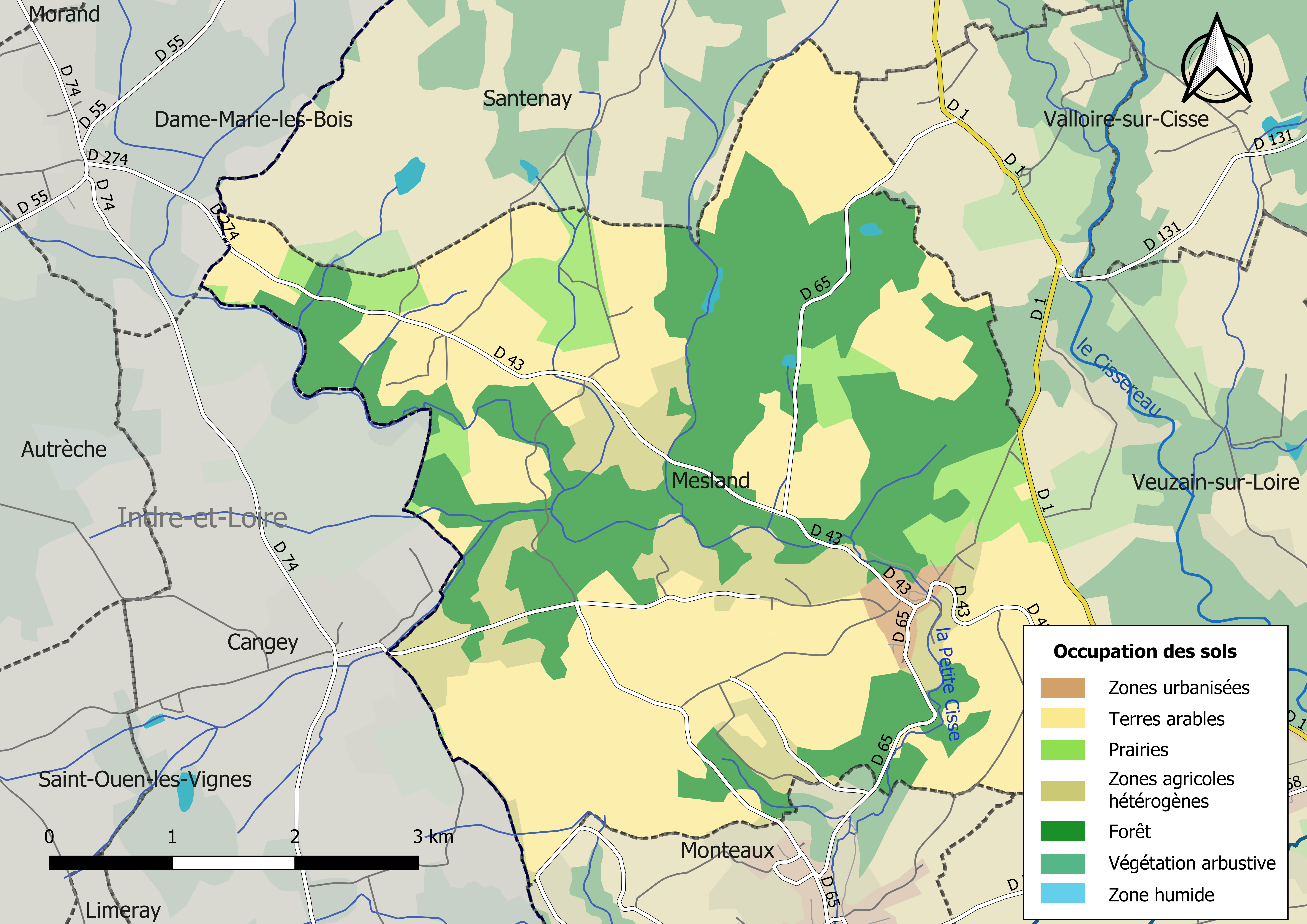 Carte des infrastructures et de l’occupation des sols en 2018 de la commune de Mesland (France).